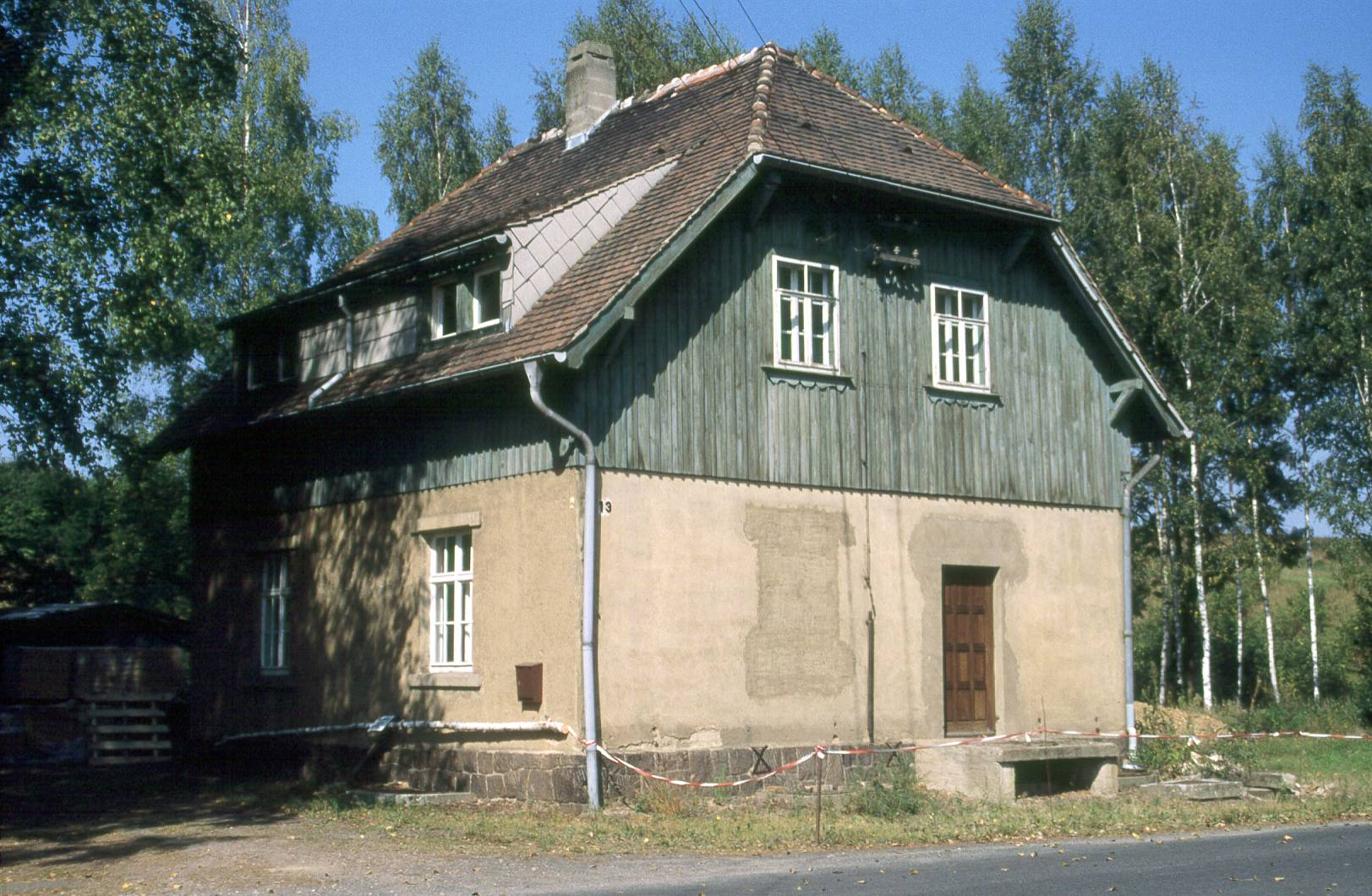 Abzweigung der Schmalspurstrecke Meißner Rübenbahn in Mertitz